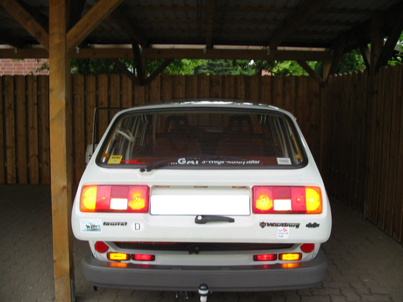 Wartburg 1.3 Tourist (1989): Neue Leuchten im Heck.